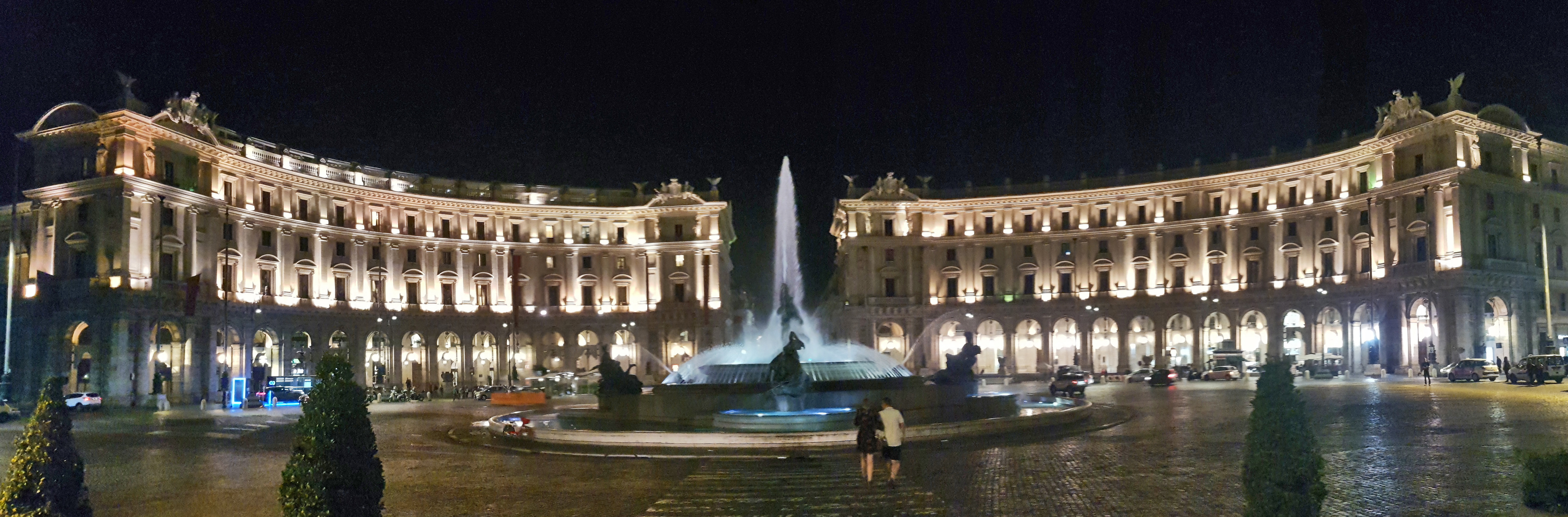 Piazza della Repubblica - 2019-10-26